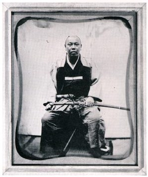 旗本・木村芥舟（吉毅・摂津守・兵庫頭、1830 - 1901）肖像。慶応元年8月、36歳、大坂にて。